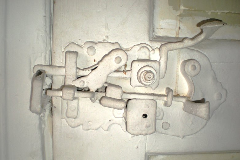 Bauernhaus "Villa Goldonkel" in Pfronten, altes Türschlosss